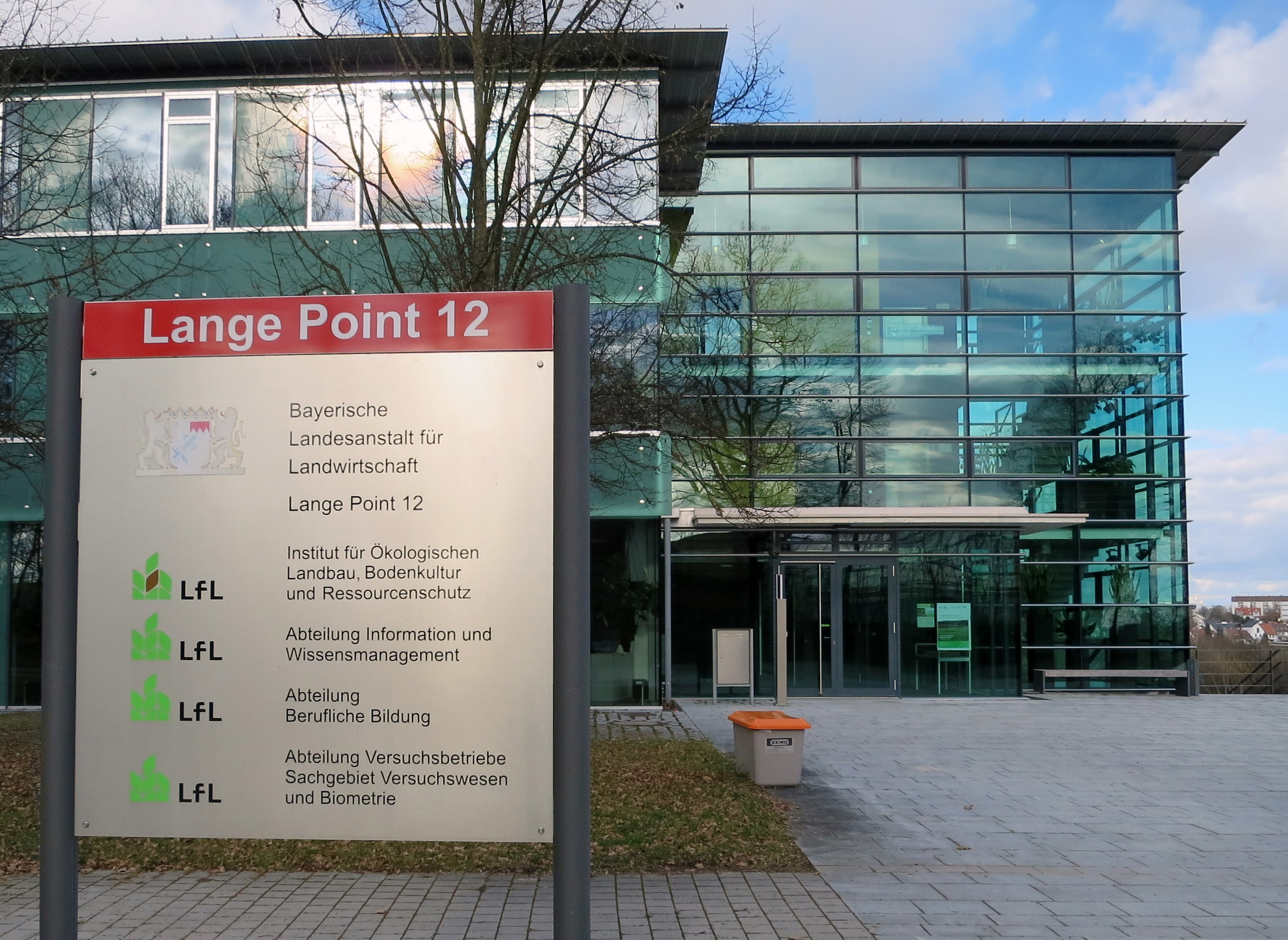 Institut der LfL